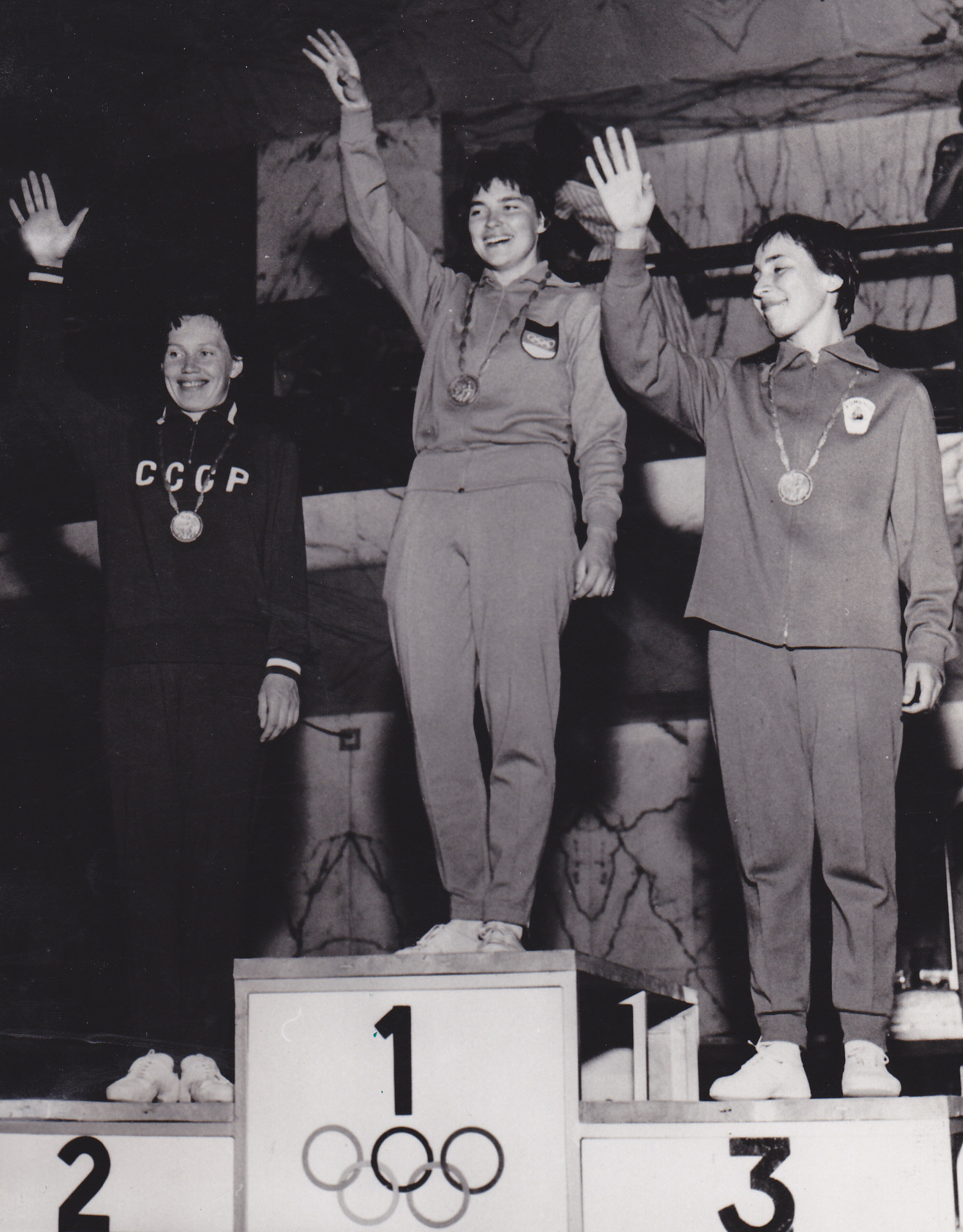 Valentina Rastvorova, Heidi Schmid, Maria Vicol, 1960 Olympics